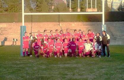 Formación de Alcobendas Rugby. Temporada 2008/2009